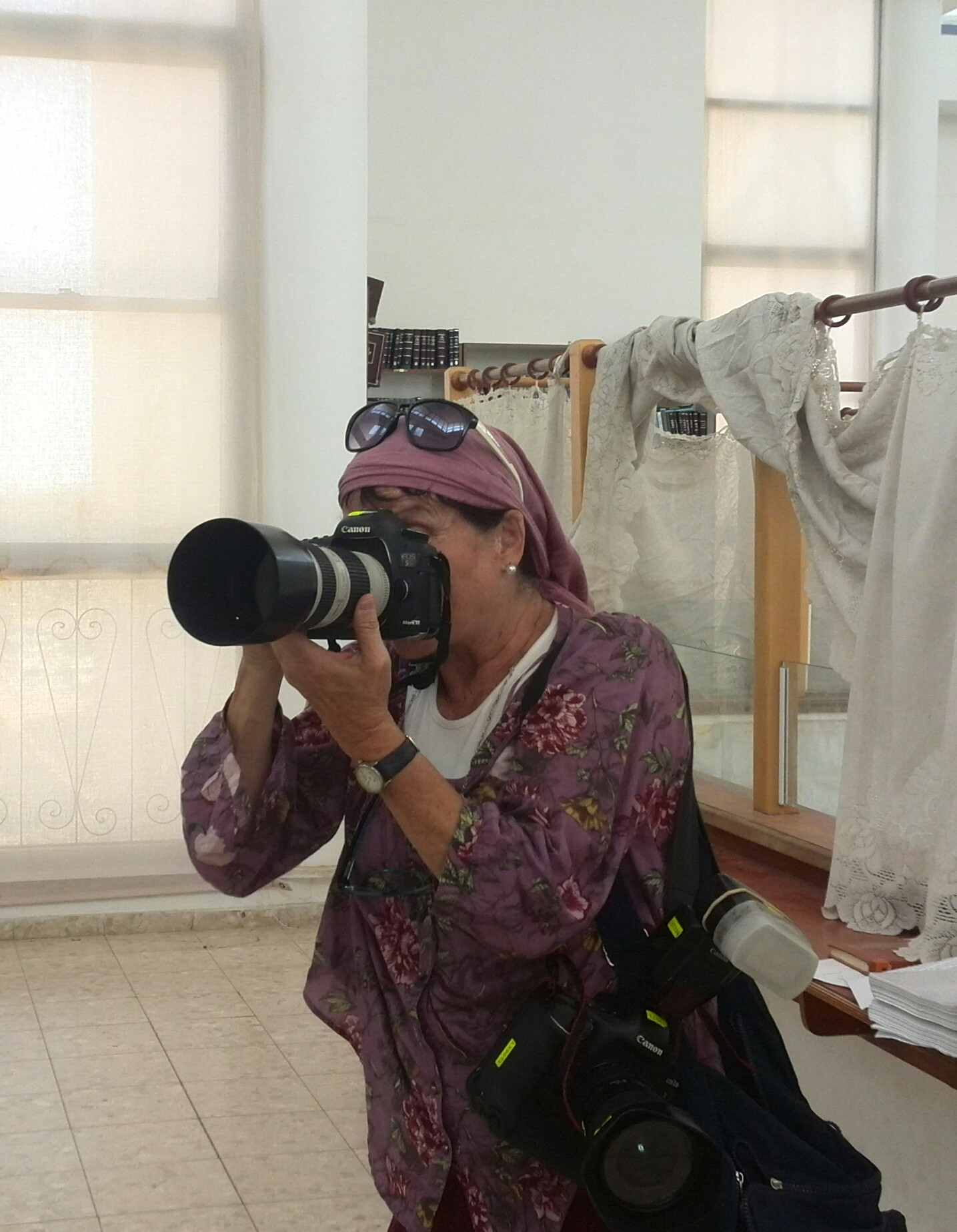 הצלמת מרים צחי